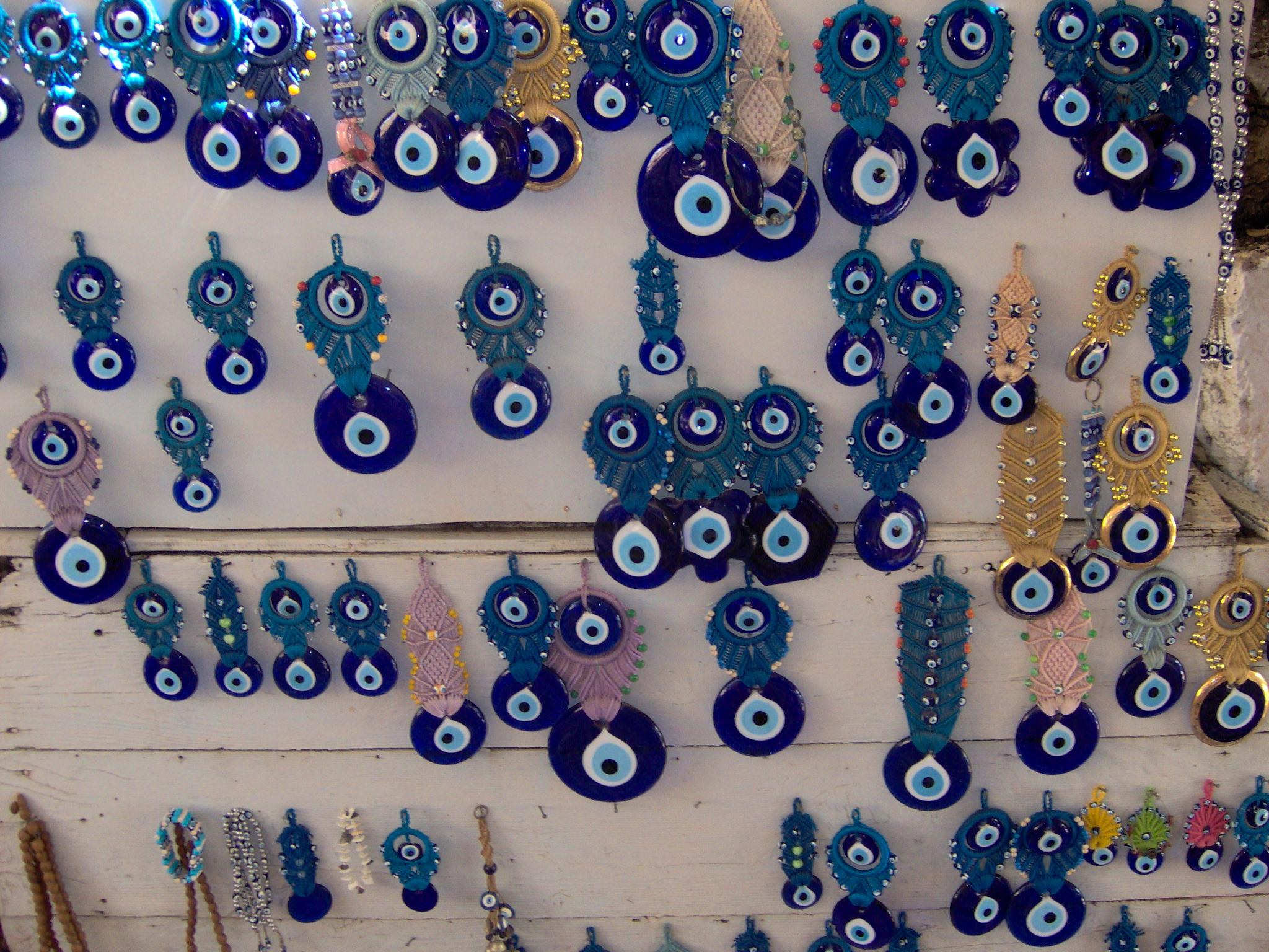 דוכן בסימנה, טורקיה, המציג חפצים הקרויים נאזאר להגנה מפני עין הרע